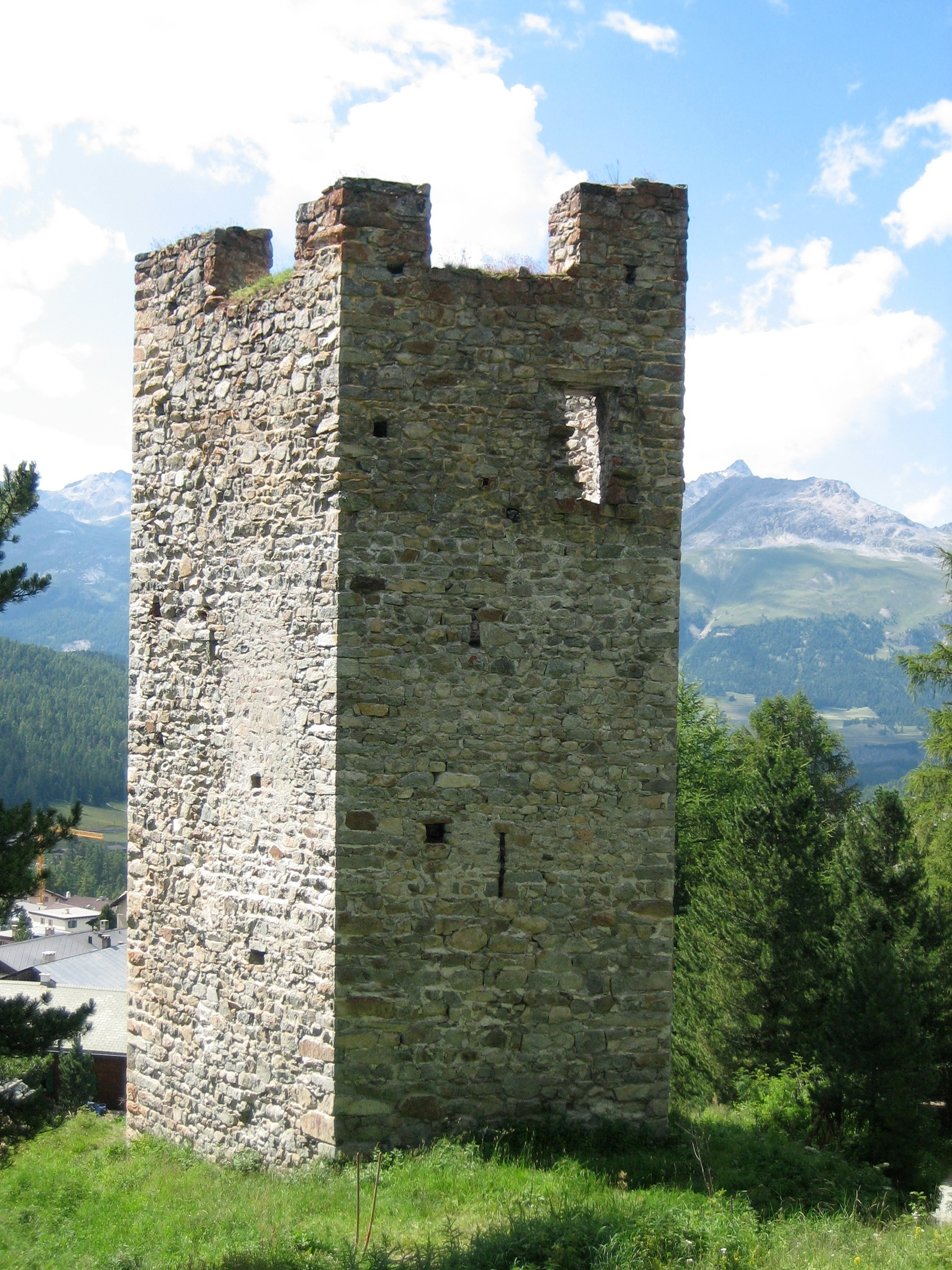 Turm Spaniola, Nordseite